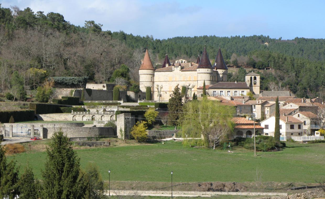 Village de Chambonas (Ardèche)